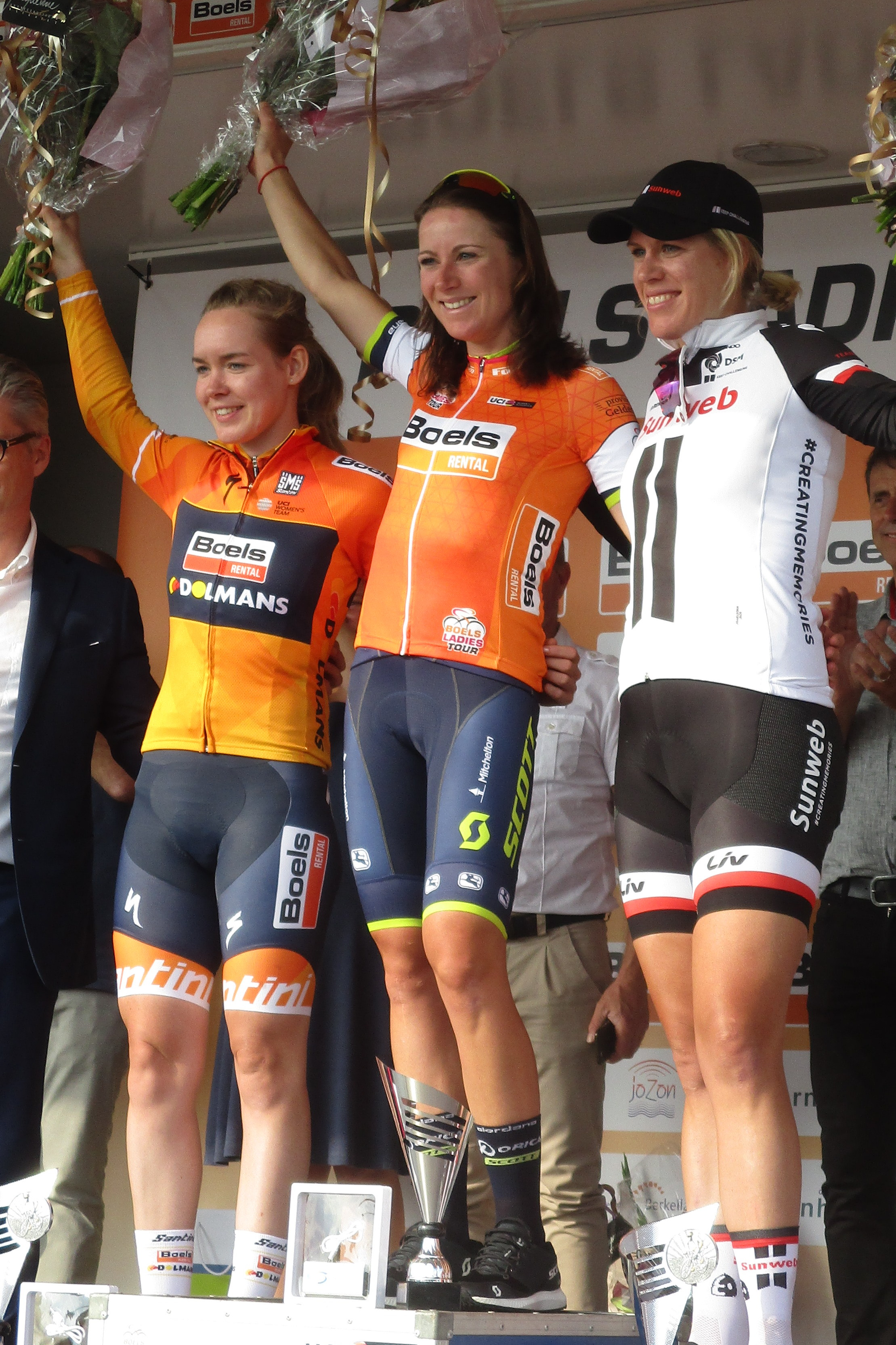 Huldiging van de winnaars van de Boels Ladies Tour 2017 op het Tom Dumoulin Bike Park in Sittard-Geleen.